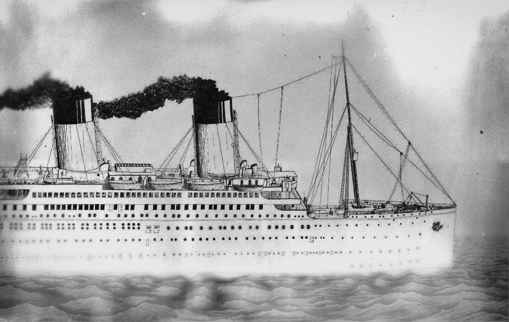 Imágen del Titanic